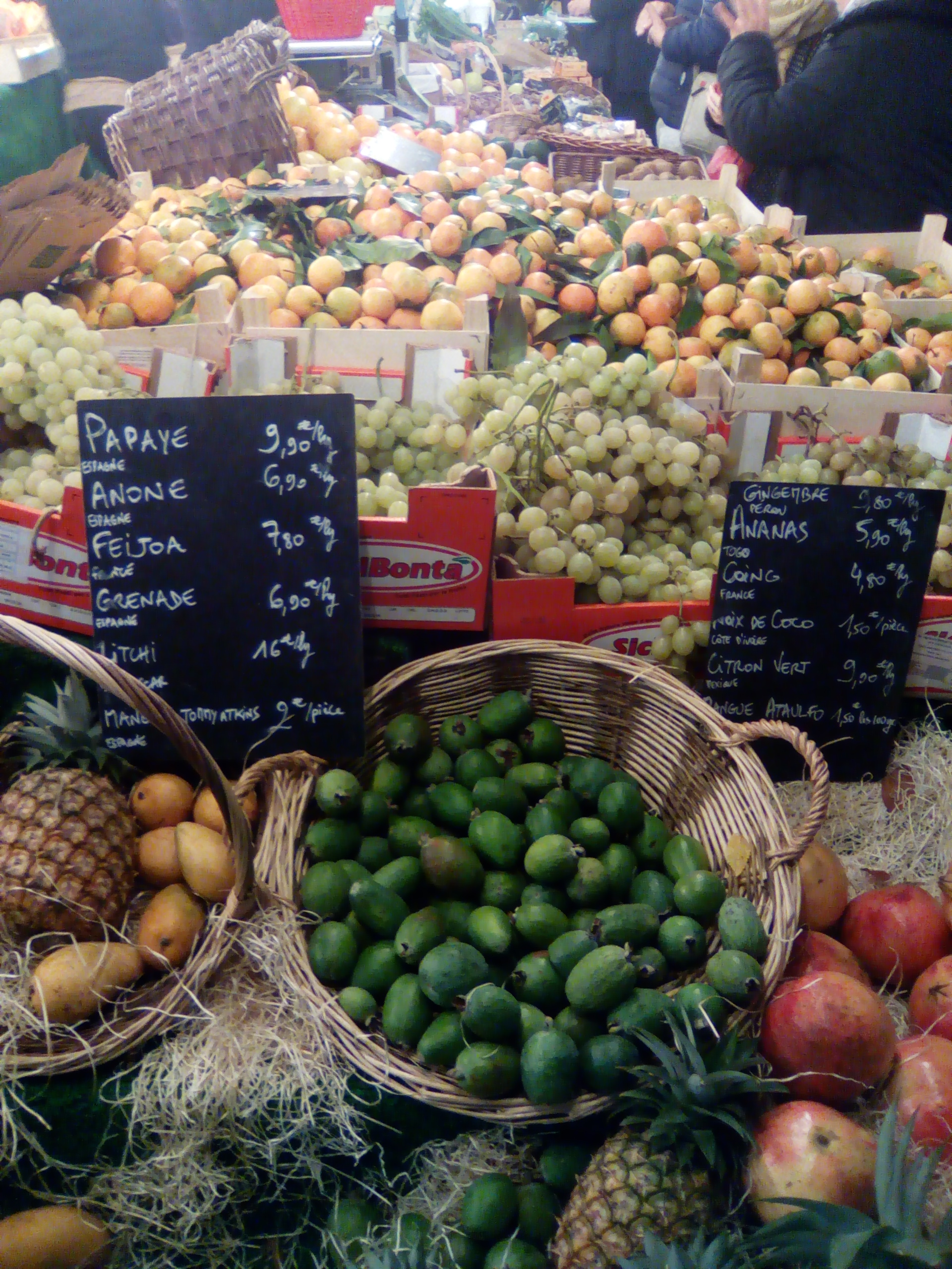 Stand au salon bio "Marjolaine"